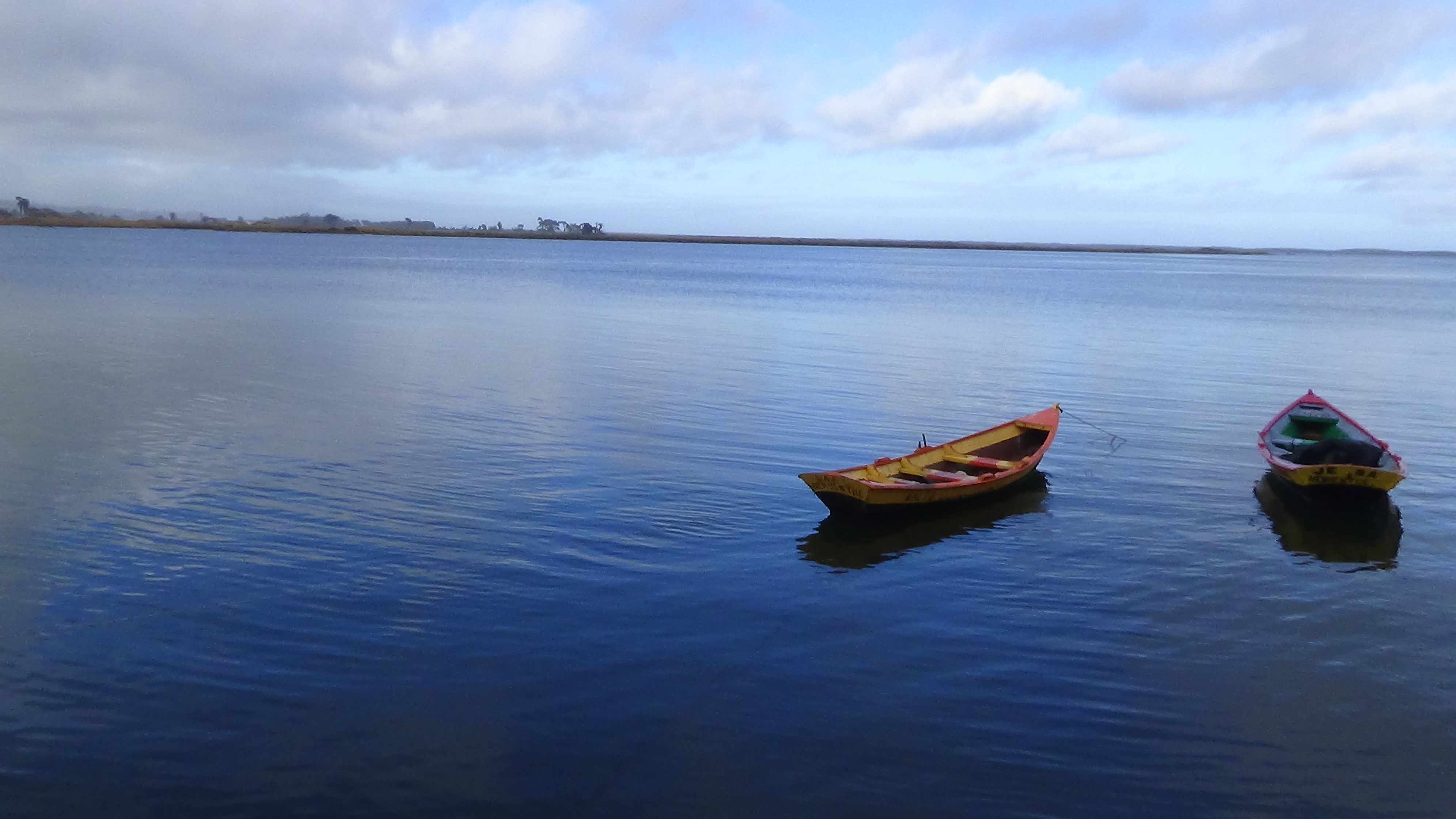 caleta en Nehuentue